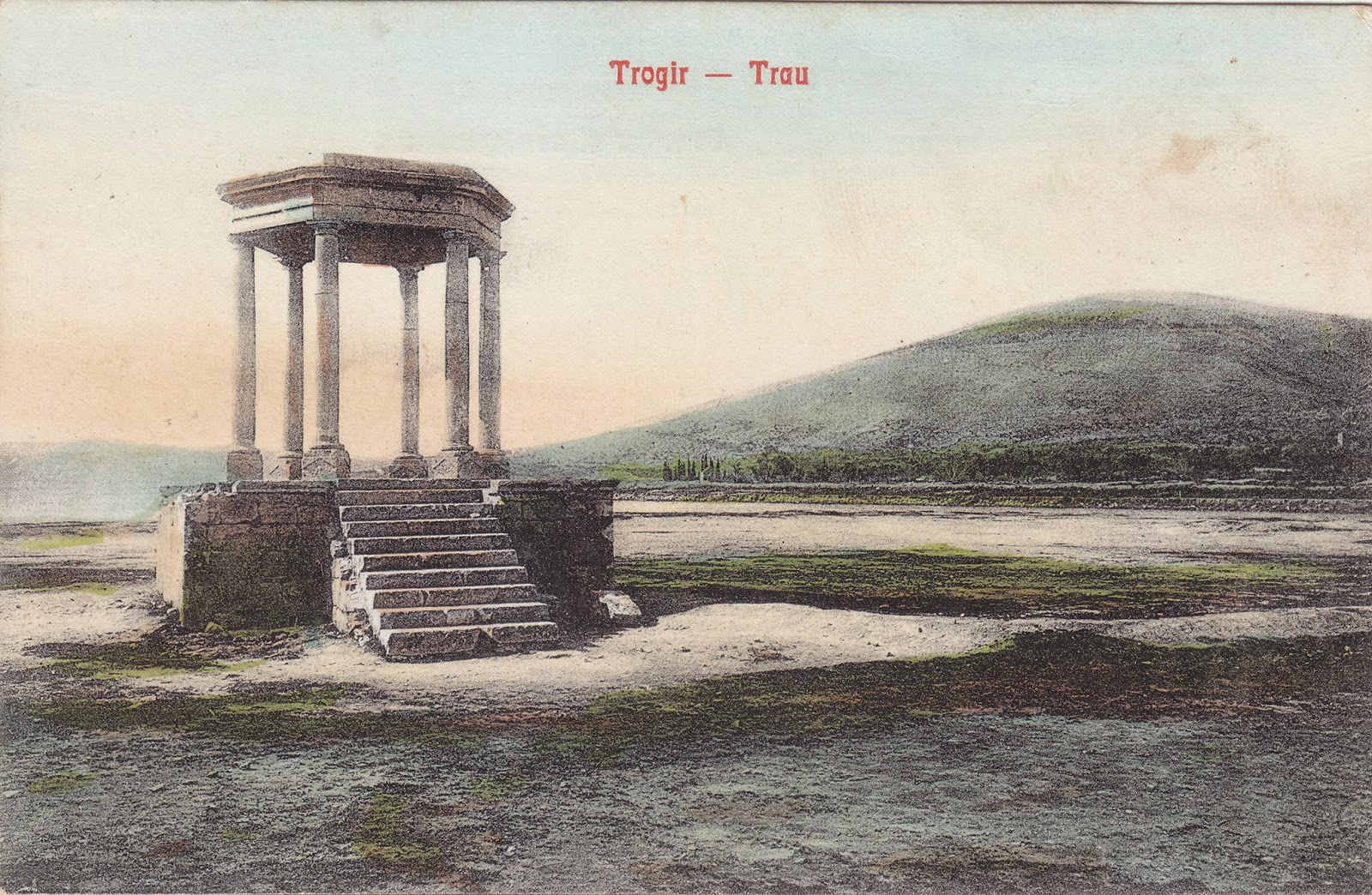 „Marmontov glorijet“, u Trogiru